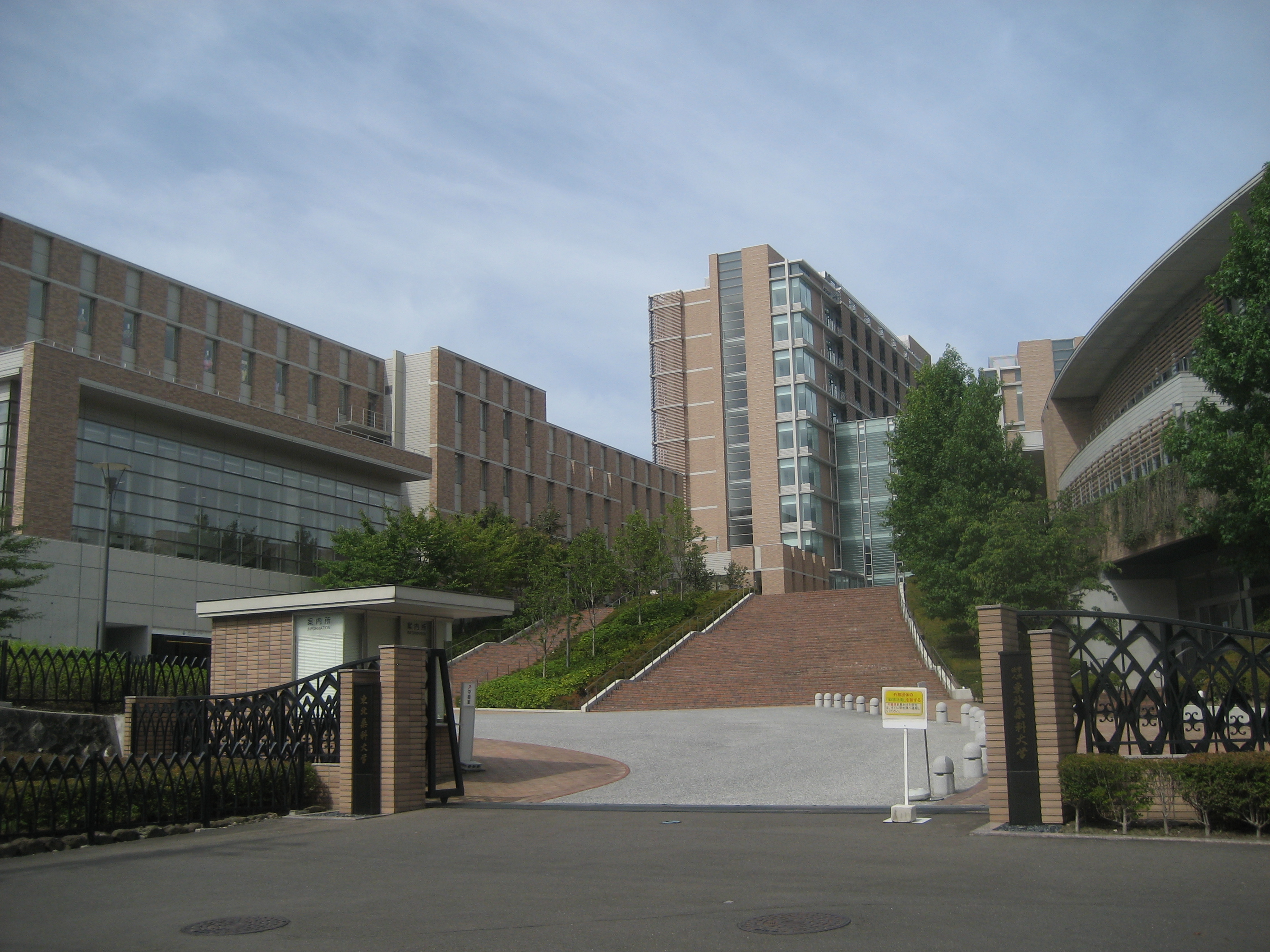 宮城県仙台市にある東北薬科大学（キャンパス入口付近を撮影）